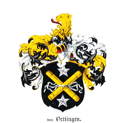 no original descrption